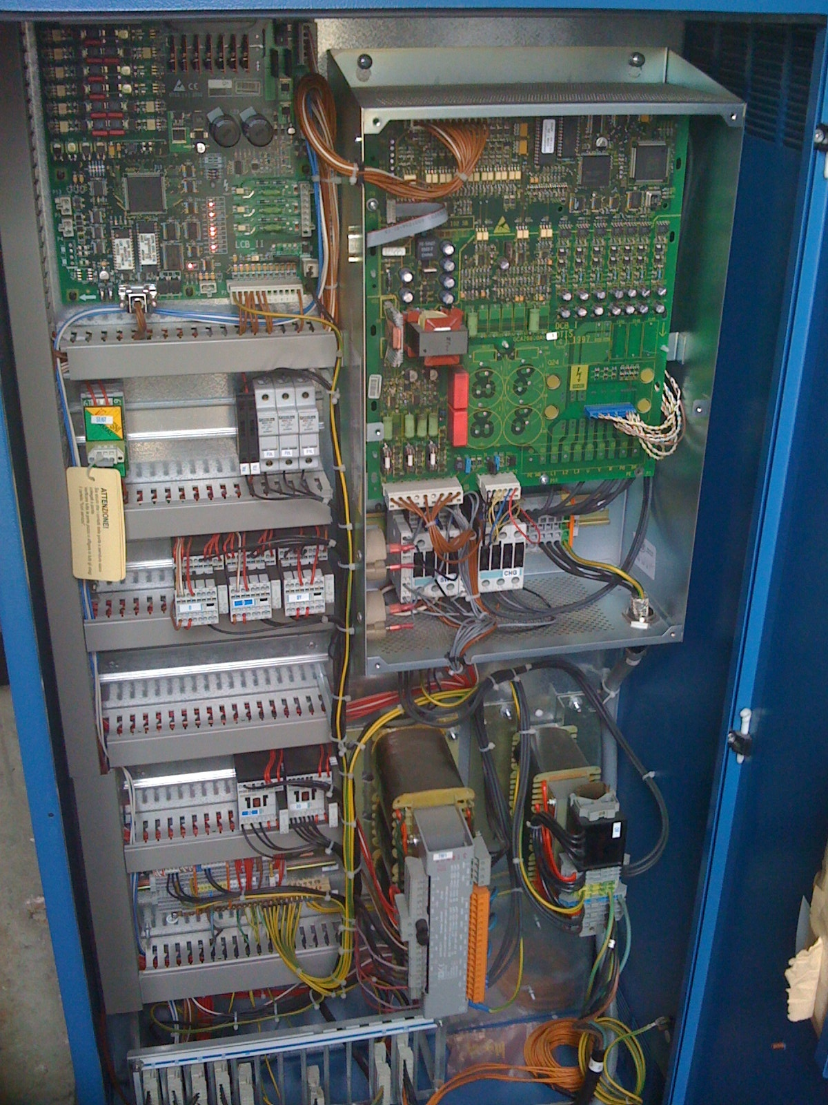 Contrôleur Otis MCS 220-OVF10 carte LCBII